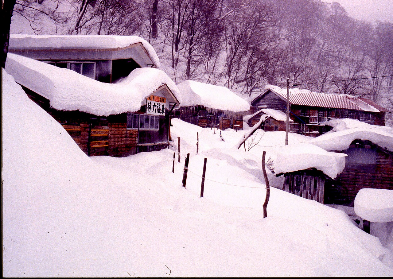 孫六温泉の冬